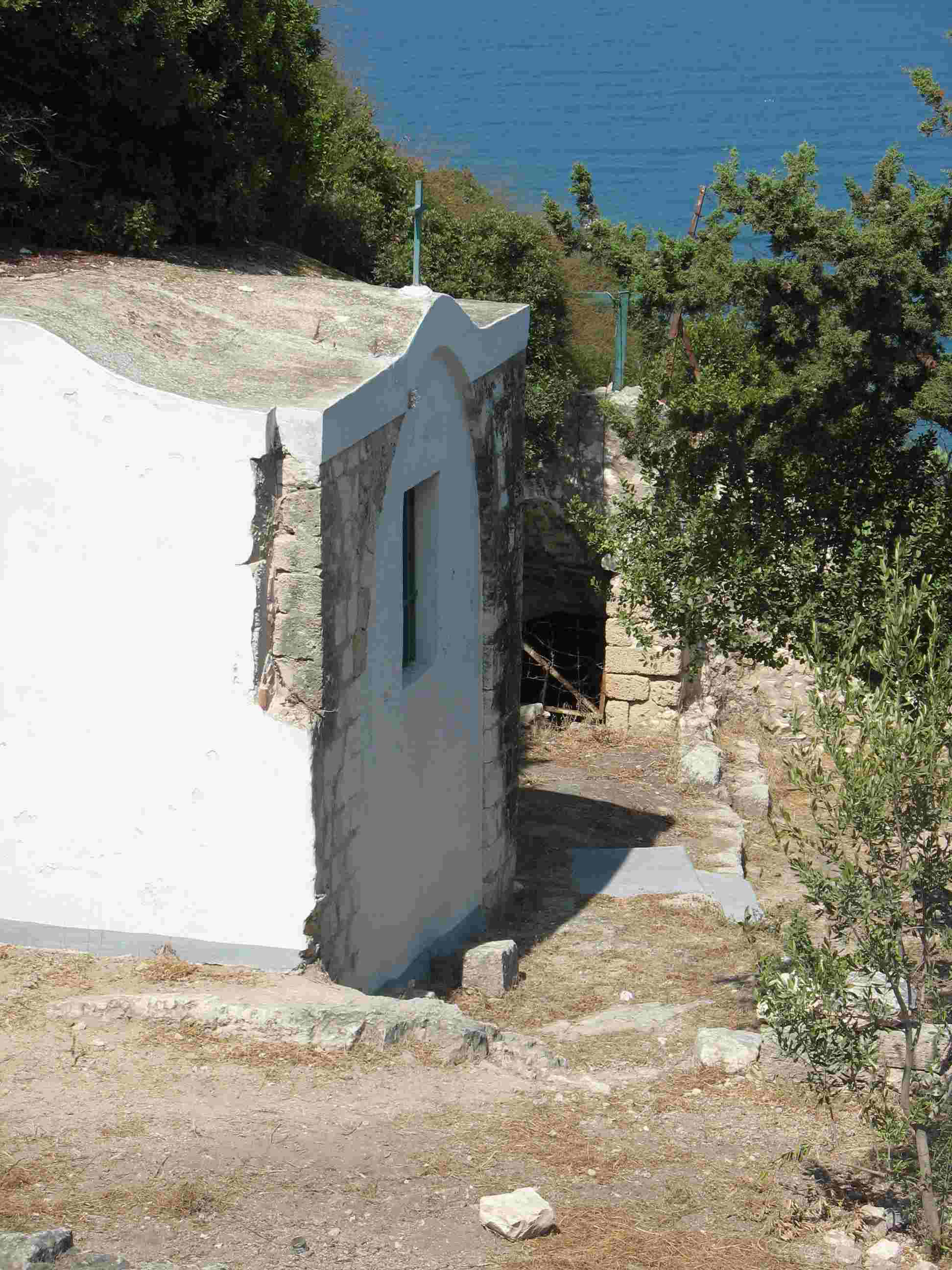 מערות פרוספר כיום